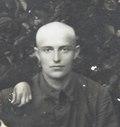 Багазій Володимир Пантелеймонович